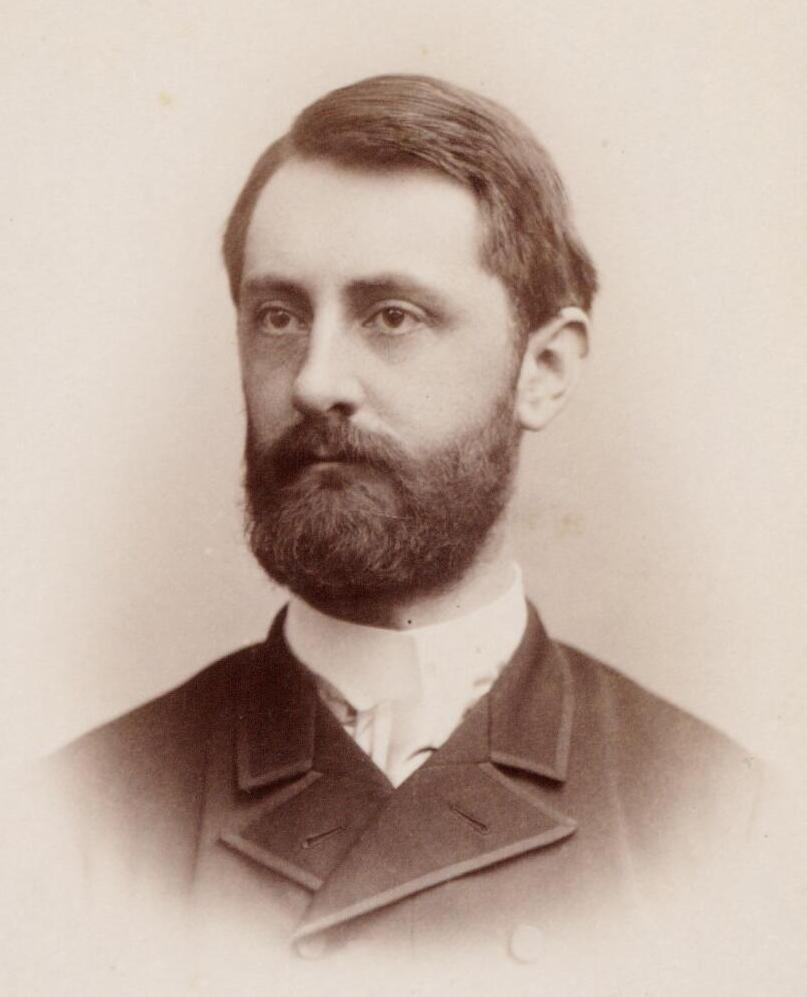 Hendrik Jacob Herman Modderman, tweede kamerlid